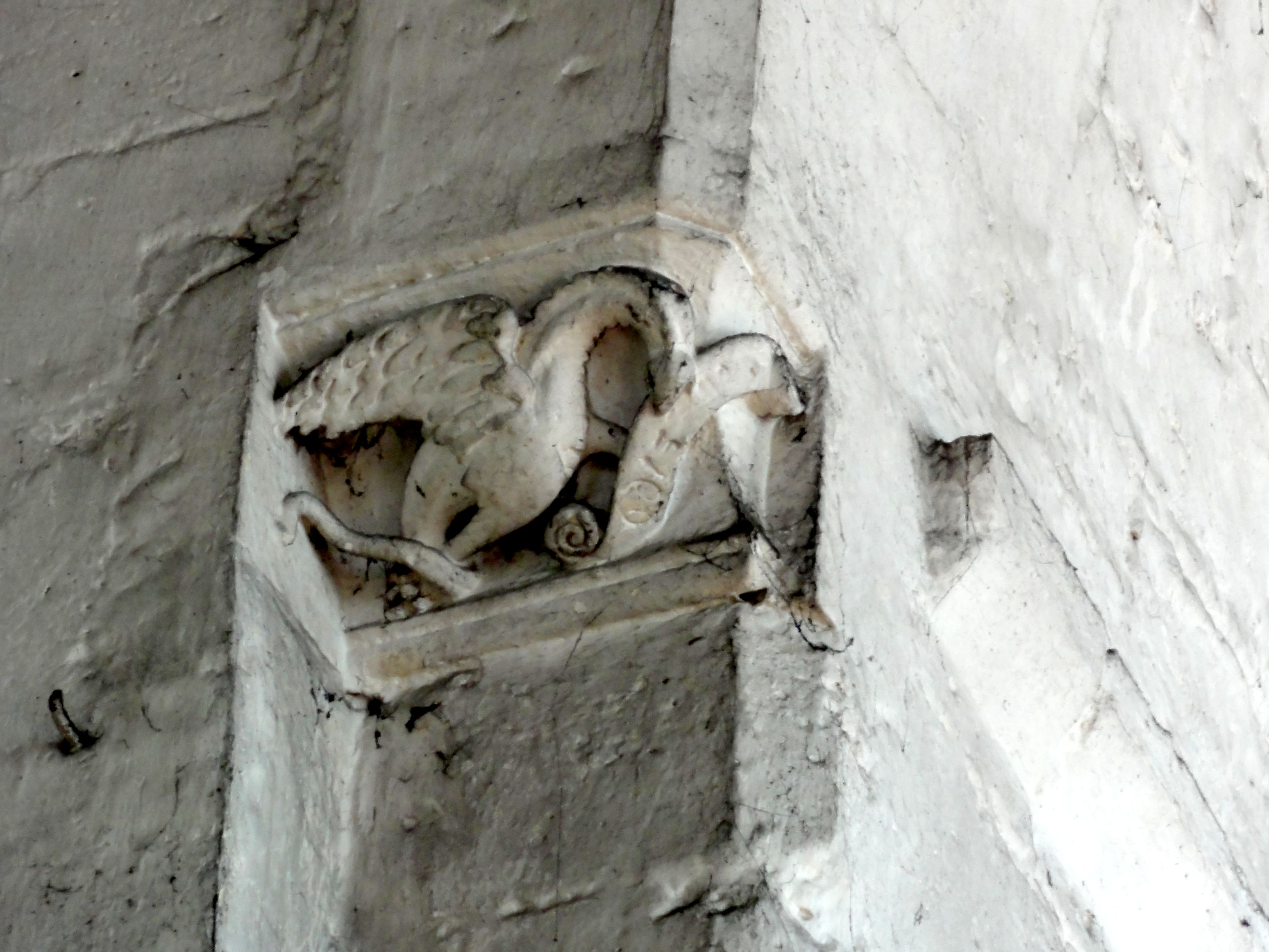 Nef, arcade vers la croisée, retombée à gauche.